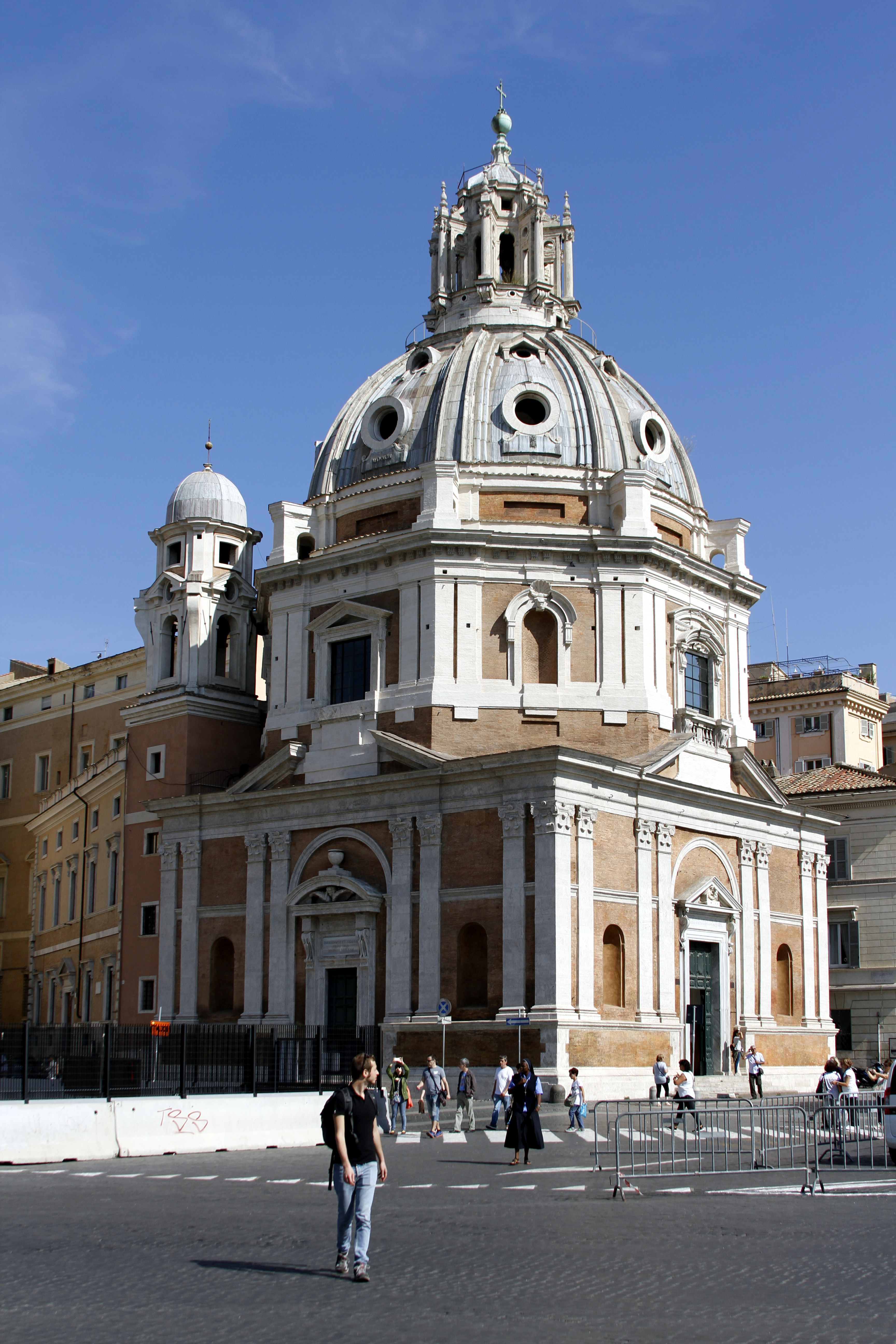 Santa Maria di Loreto - Rome